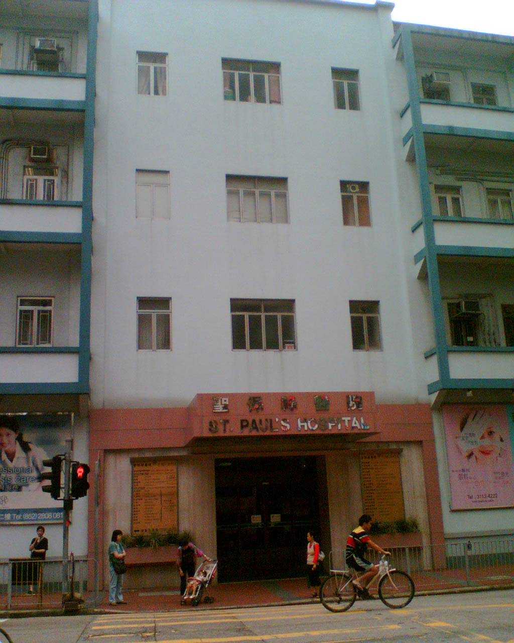 中文（香港）: 聖保祿醫院門診入口。